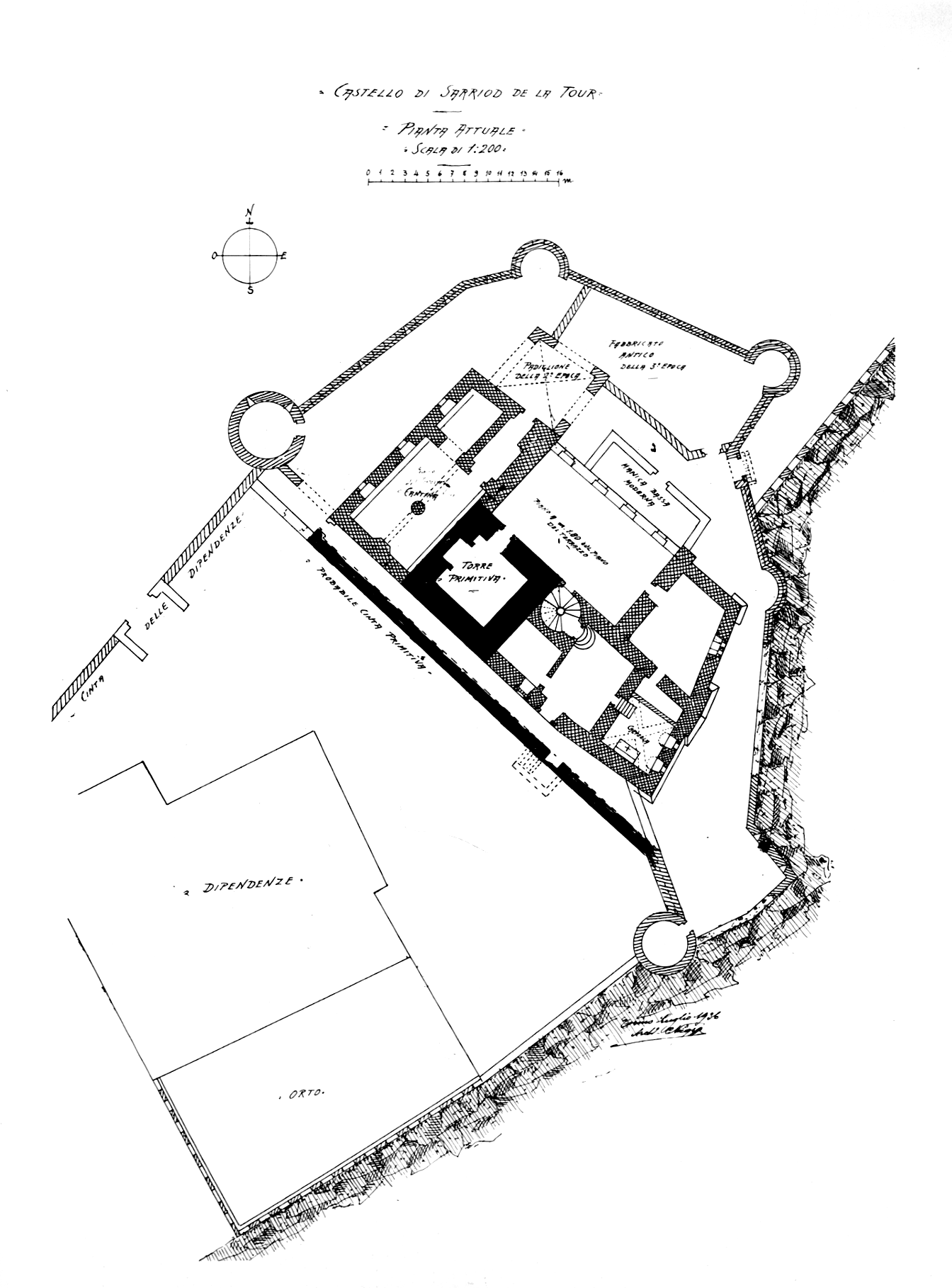 Pianta del castello di Sarriod de la Tour, Saint-Pierre, Valle d'Aosta, Italia.